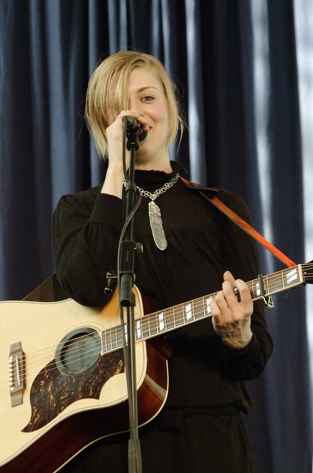 Anna Ternheim, 25.3.2007, Cultureel Podium Roepaen, Ottersum, NL